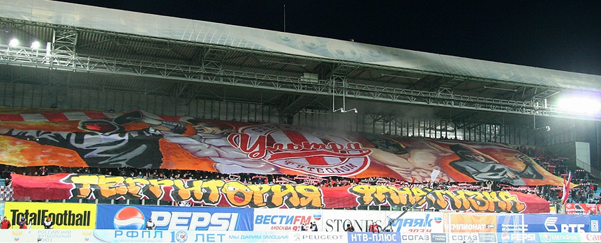 Перфоманс "Территория фанатизма" на матче с "Динамо" в Химках. 2011 год